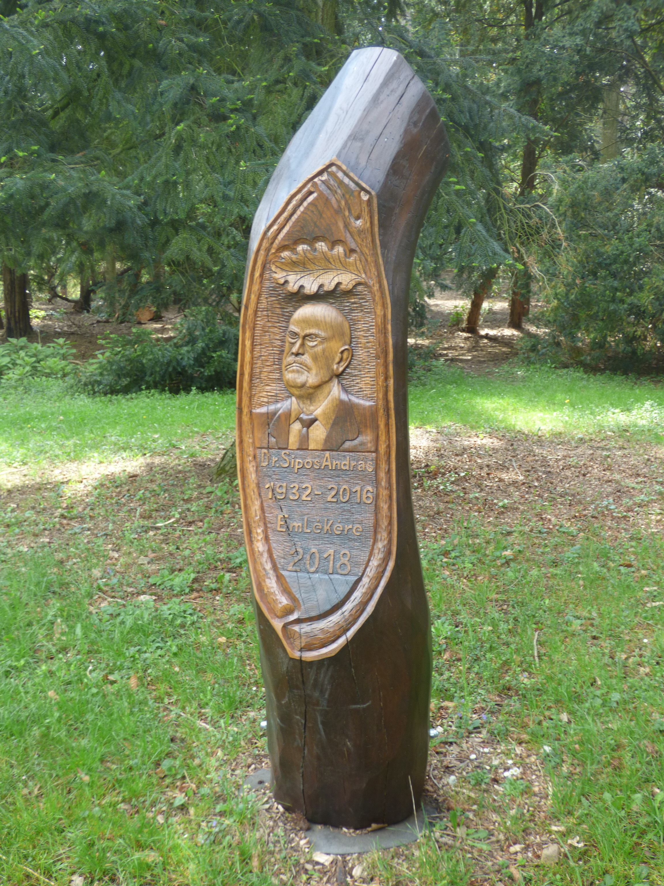 Sipos András emlékműve a szarvasi arborétumban